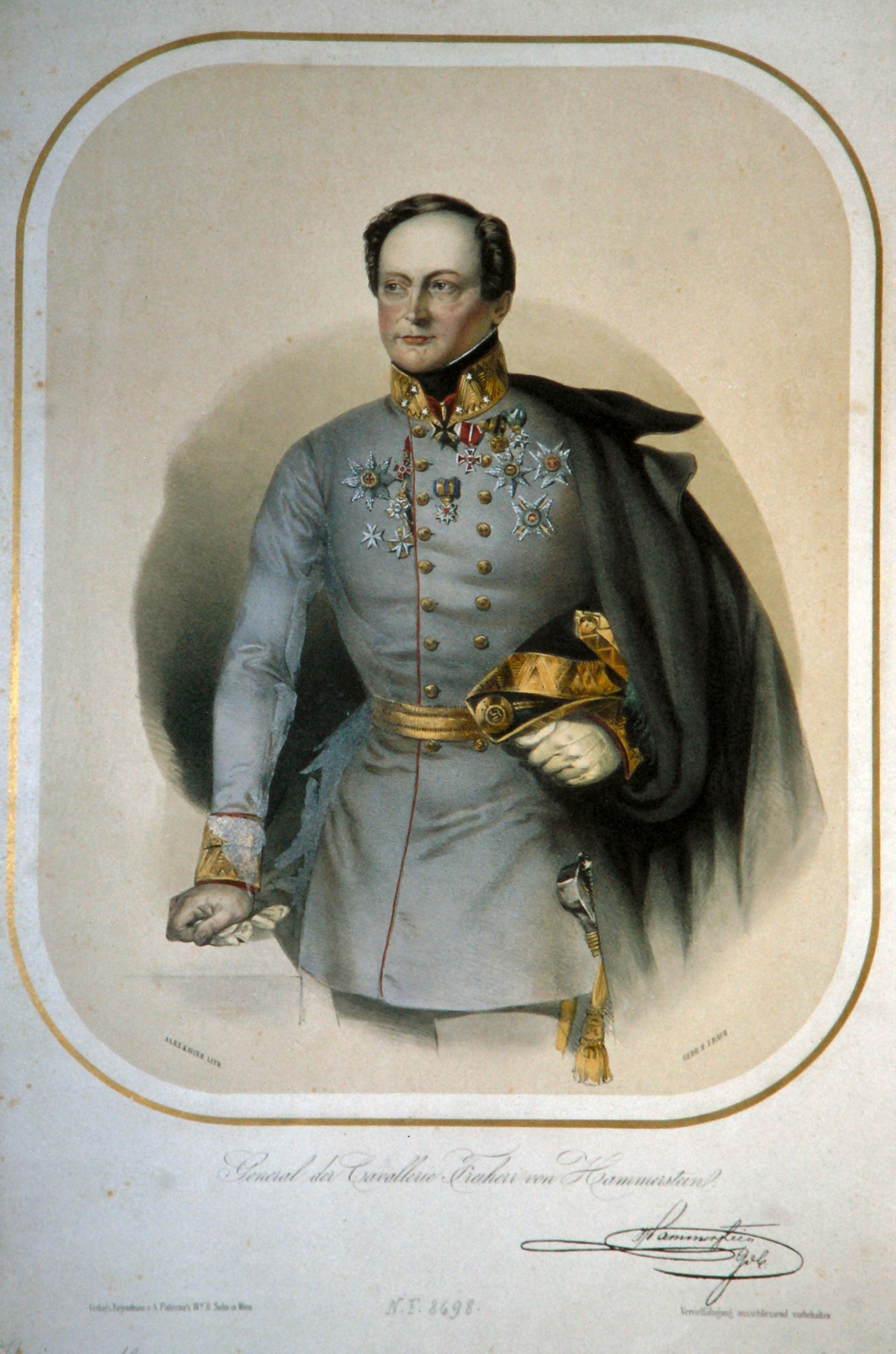 Wilhelm Friedrich Hammerstein-Wquord (1785-1861), k. k. General der Kavallerie, Lithographie von Alexander Kaiser, um 18510